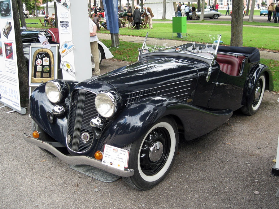 1936 Aero 50 Roadster_IMG_0291